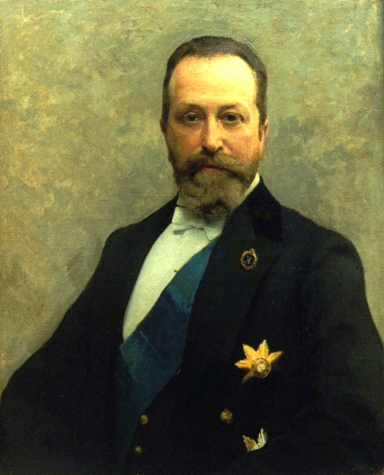 Портрет министра финансов Российской империи графа В.Н.Коковцева. Холст, масло. 86.0 х 70.5. Вверху справа: Э.Визель. 900.